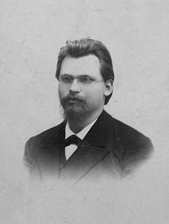 Георгій Вороний (1868 – 1908).